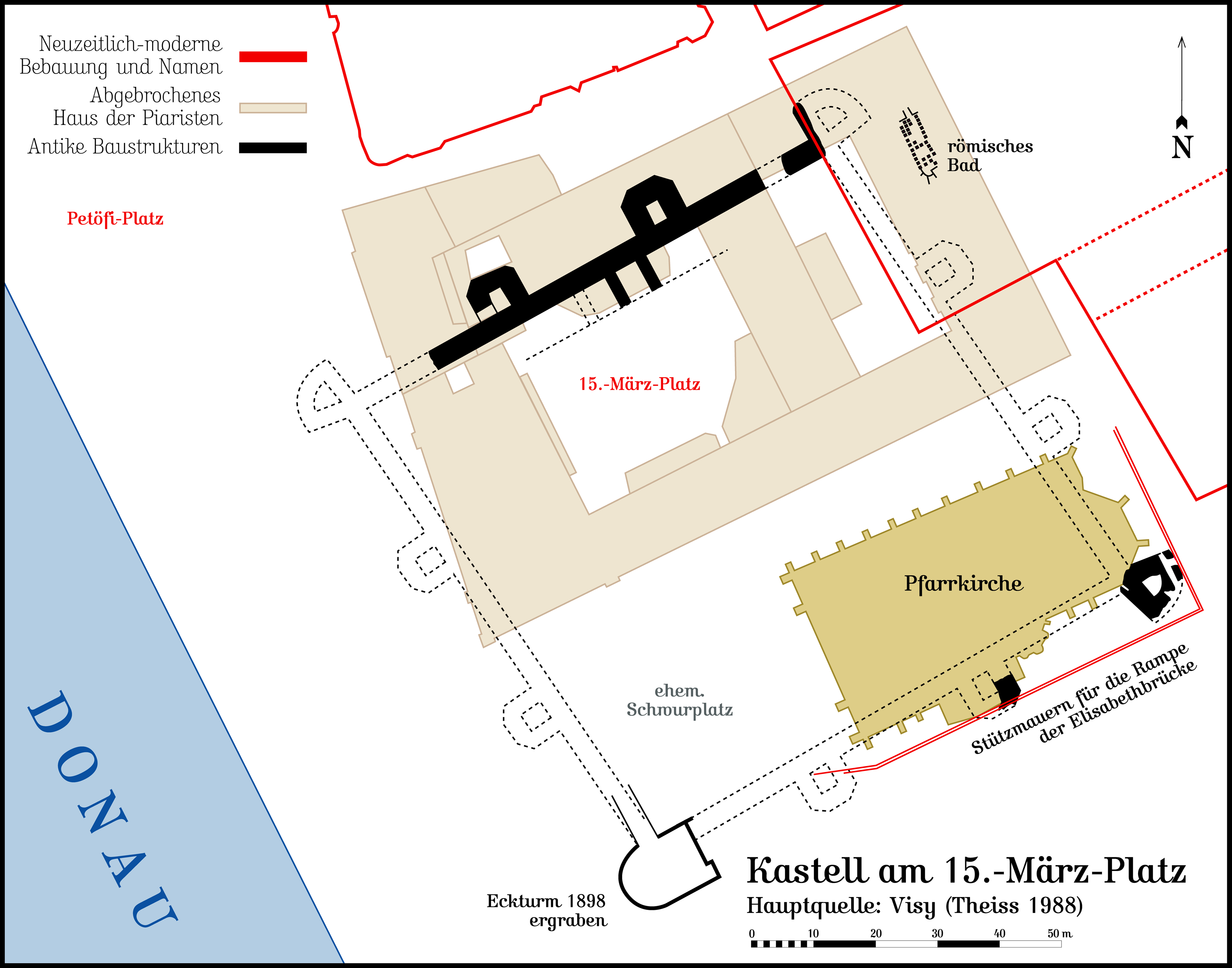 Das Contra Aquincum genannte spätantike Kastell am 15.-März-Platz im Stadtteil Pest in Budapest. Plan mit den Grabungesergebnissen des 19. und 20. Jahrhunderts. Quelle: hauptsächlich Zsolt Visy (Theiss 1988). Abb. S. 86. Gezeichnet in FreeHand MX für Macintosh; abgespeichert in Adobe Photoshop CS.